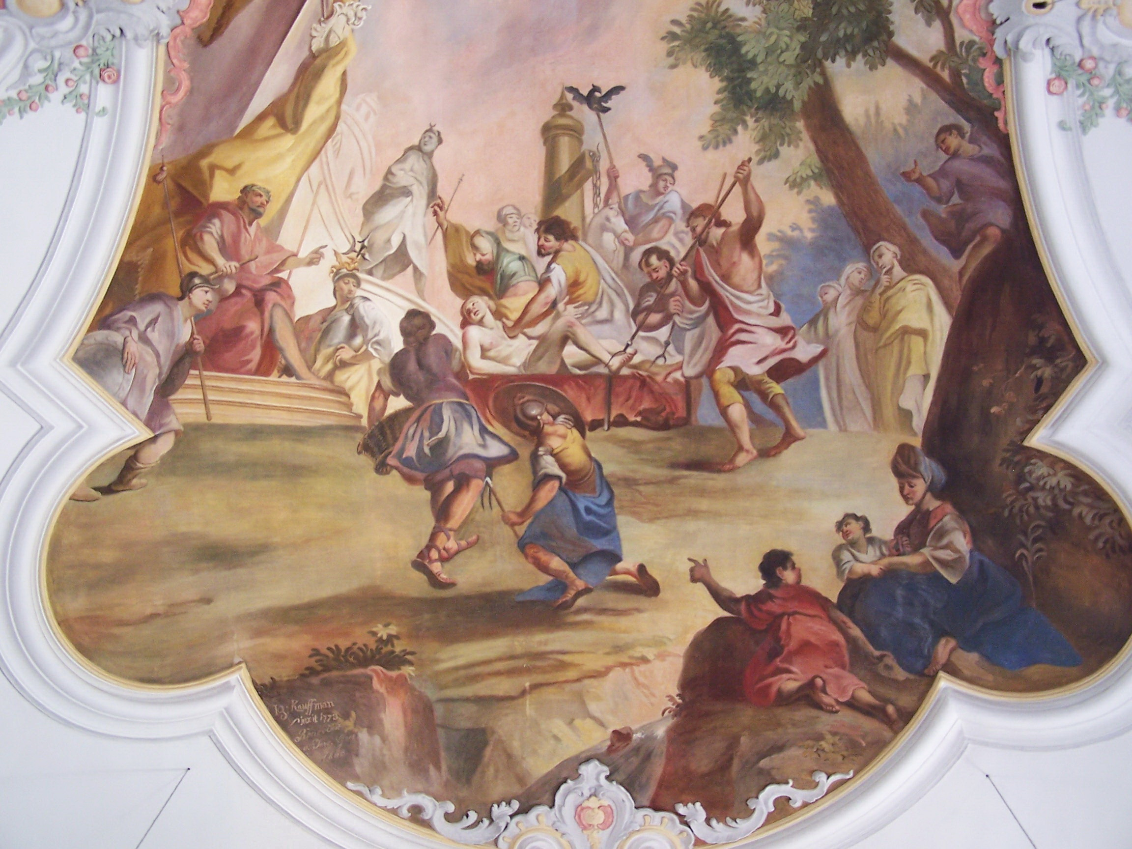 Unterneuhausen, Kirchweg 9. Saalkirche mit Westturm, barocke Anlage von 1741, mit Lisenengliederung. Das große Deckenfresko im Kirchenschiff zeigt das Matyrium des Hl. Laurentius. Das Gemälde ist bezeichnet mit Ig - Kauffmann pinxit 1773.